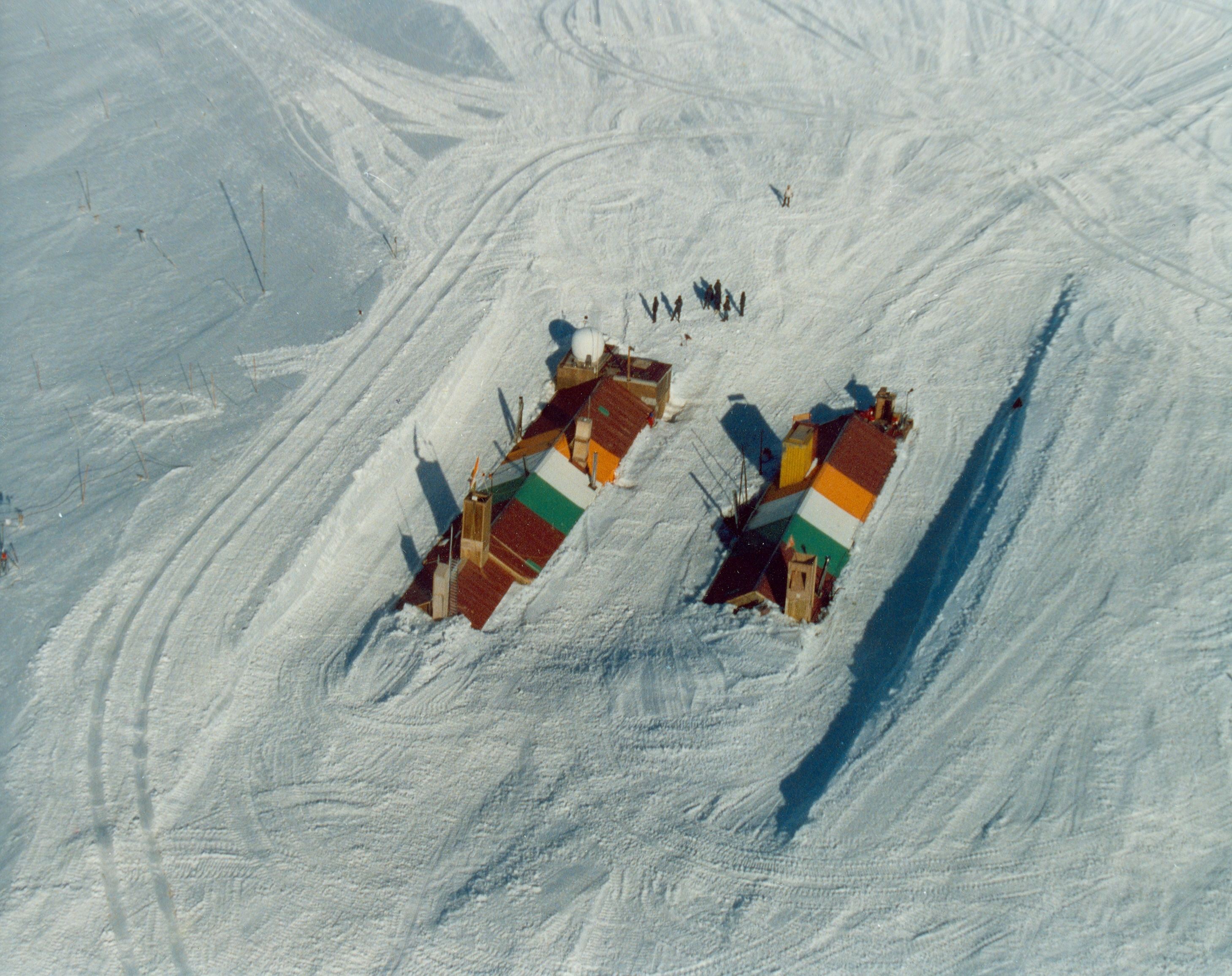 दक्षिण गंगोत्री, का दुर्लभ चित्र